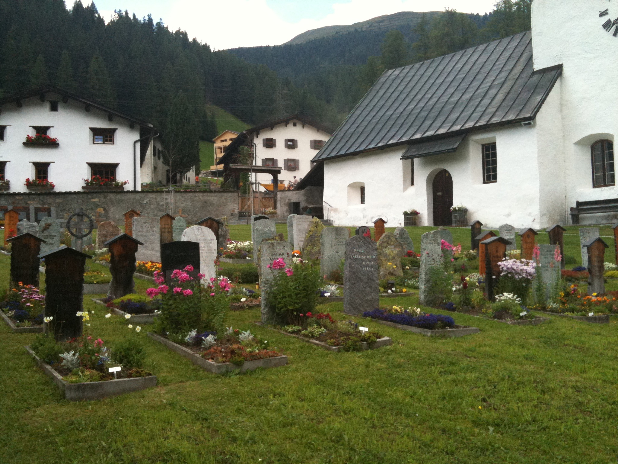 Friedhof in Davos Glaris (Kanton Graubünden)